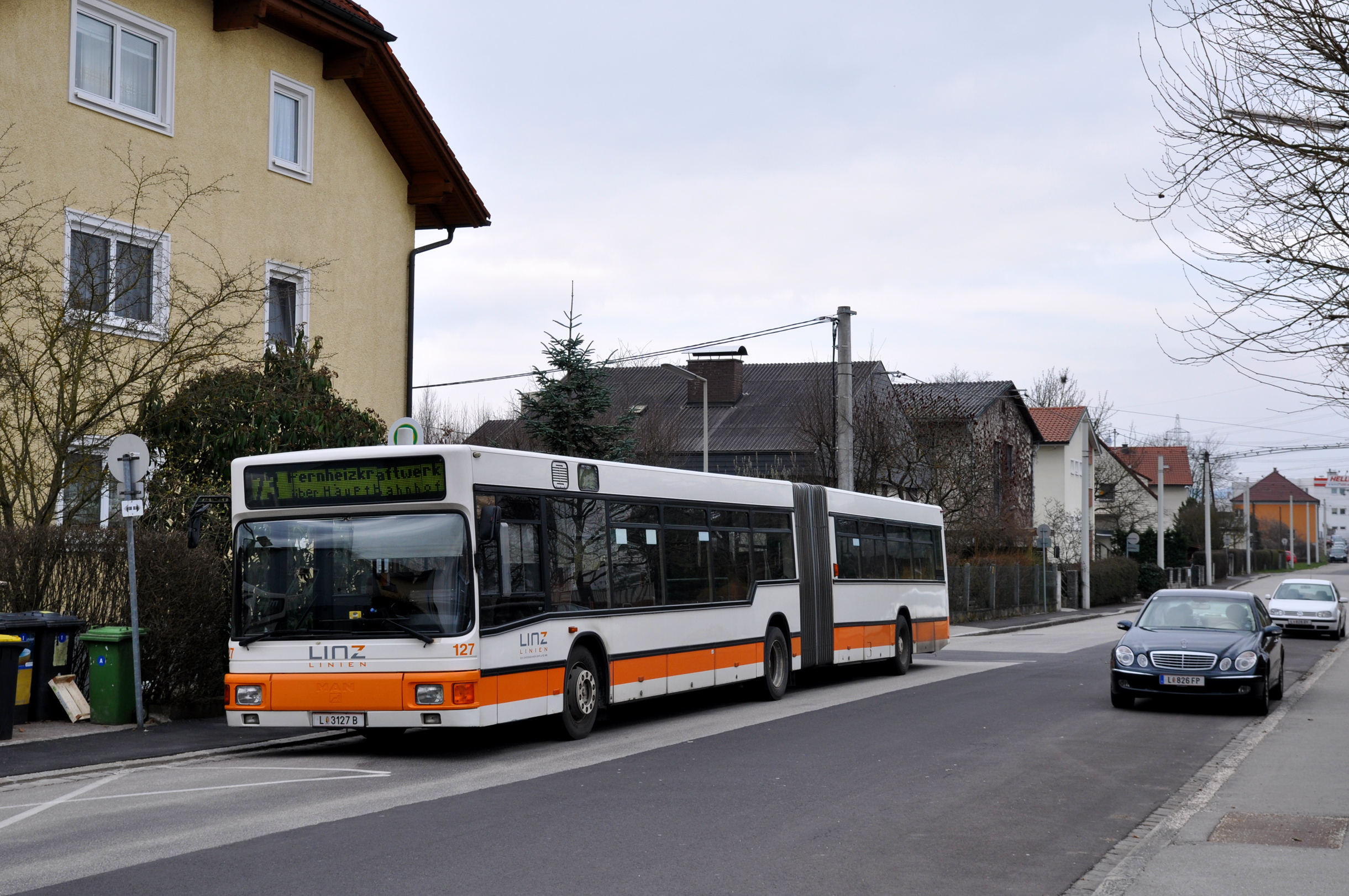 MAN NG 272, Nr. 127, als Linie 73 bei der Endstation Baintwiese.